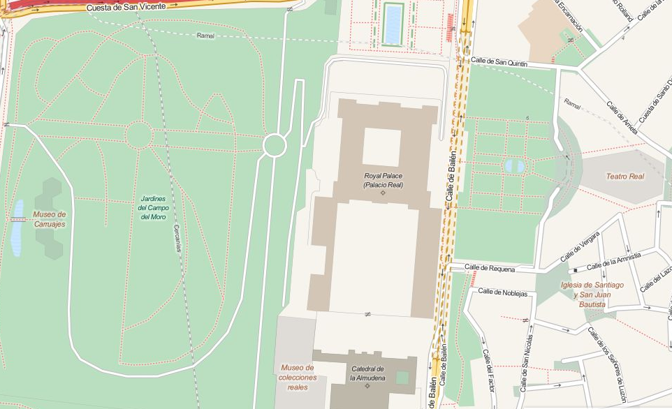 Mapa del Palacio Real de Madrid, en España, y parte de su entorno This map may be incomplete, and may contain errors. Don't rely solely on it for navigation.